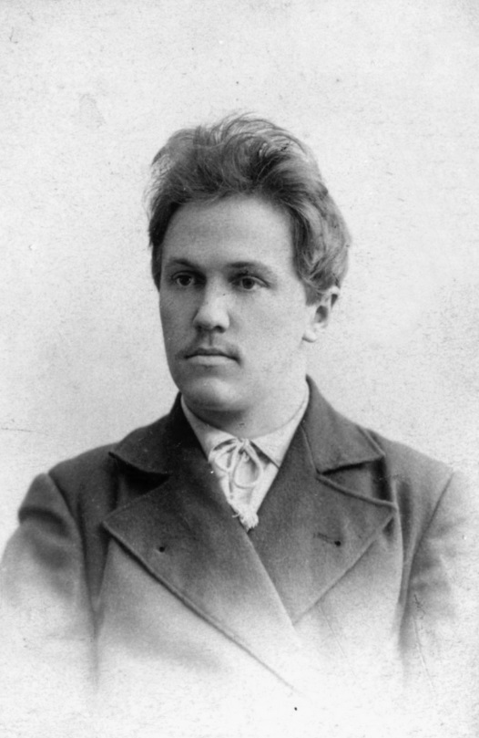 Русский советский этнограф, писатель Николай Евгеньевич Ончуков